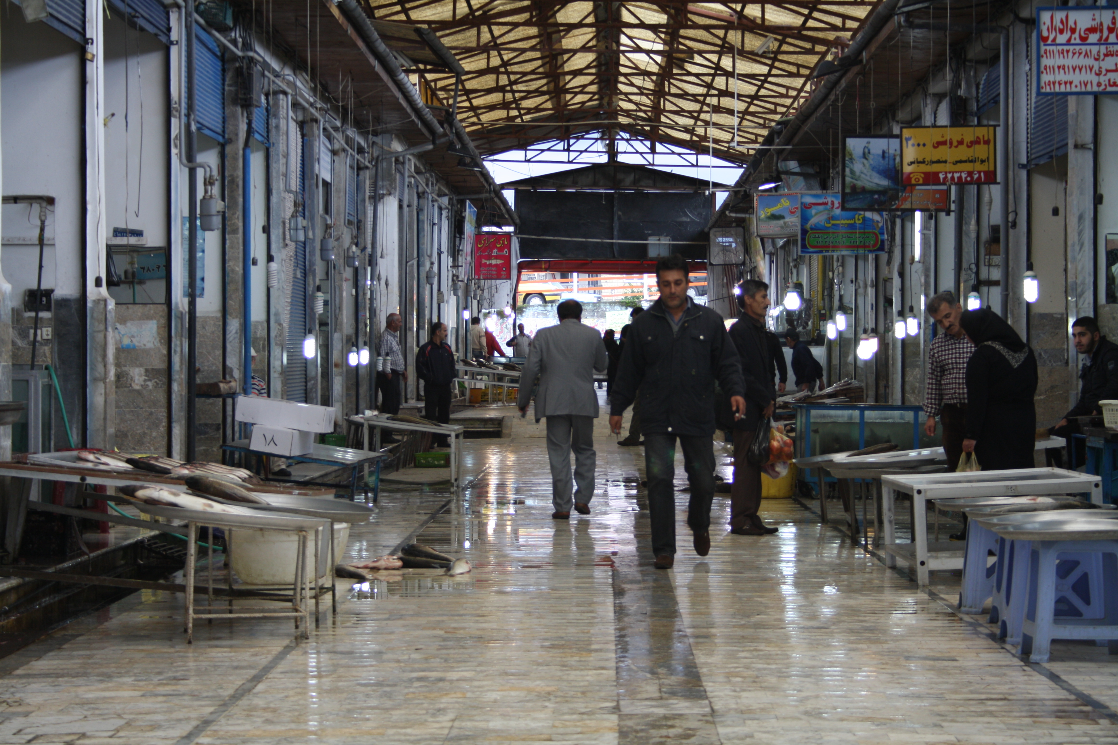 Fischmarkt am Cheshmeh Kileh Park in Tonekabon. (Shahsavar Fish Sales Center)